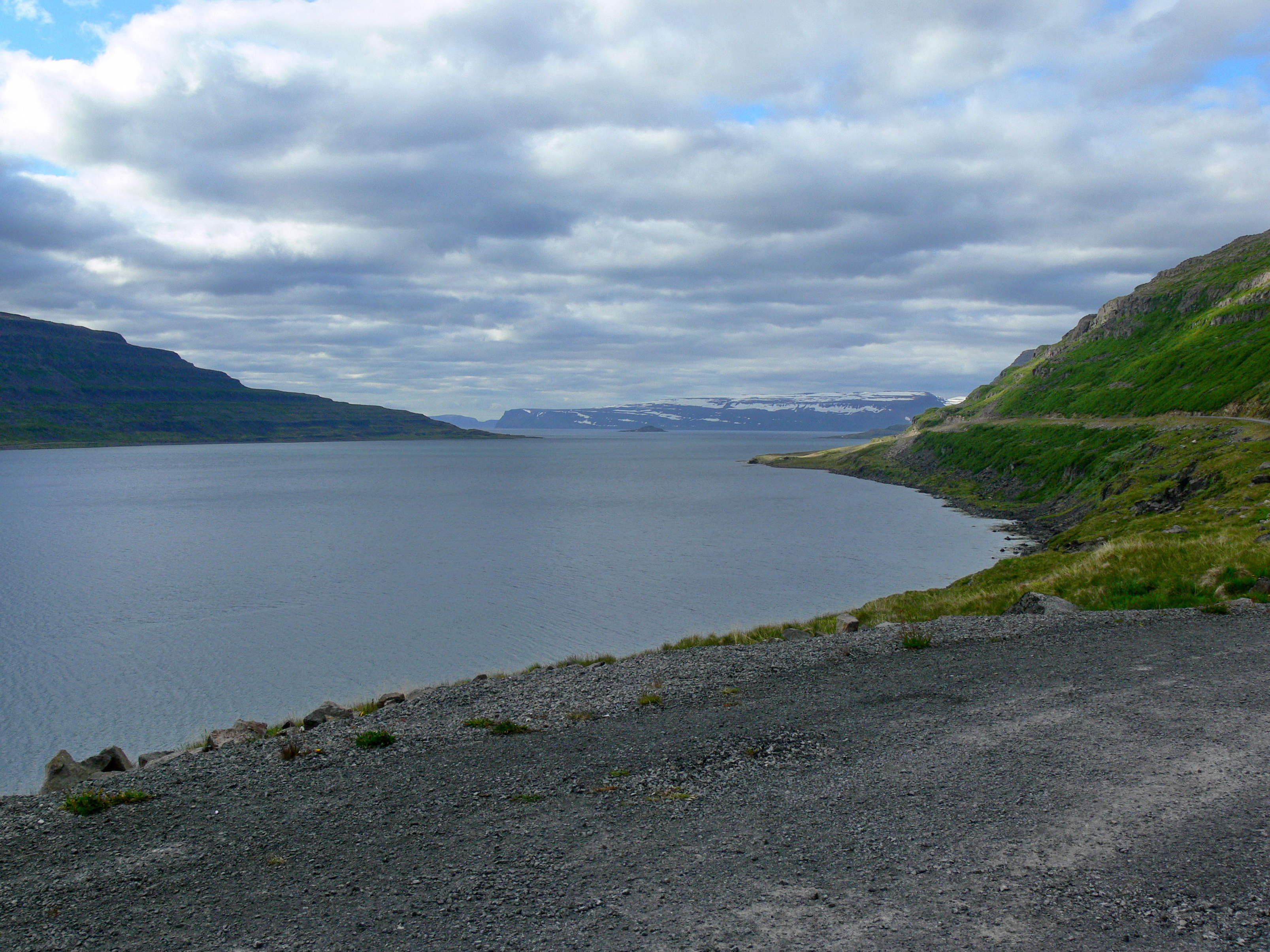 Skötufjörður, ein Seitenarm des Ísafjarðardjúp.